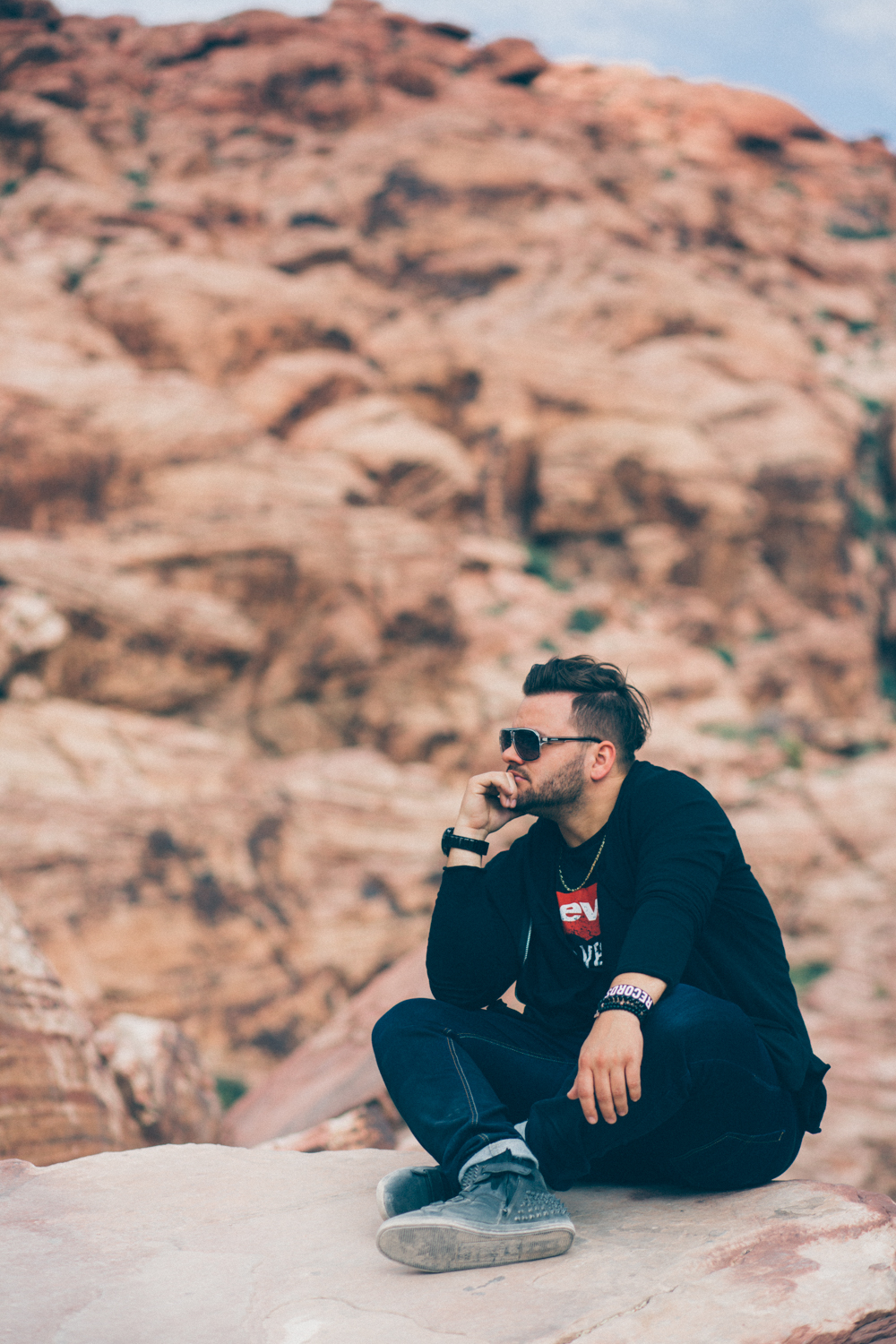 Ezdráš Hýbl z návštěvy USA